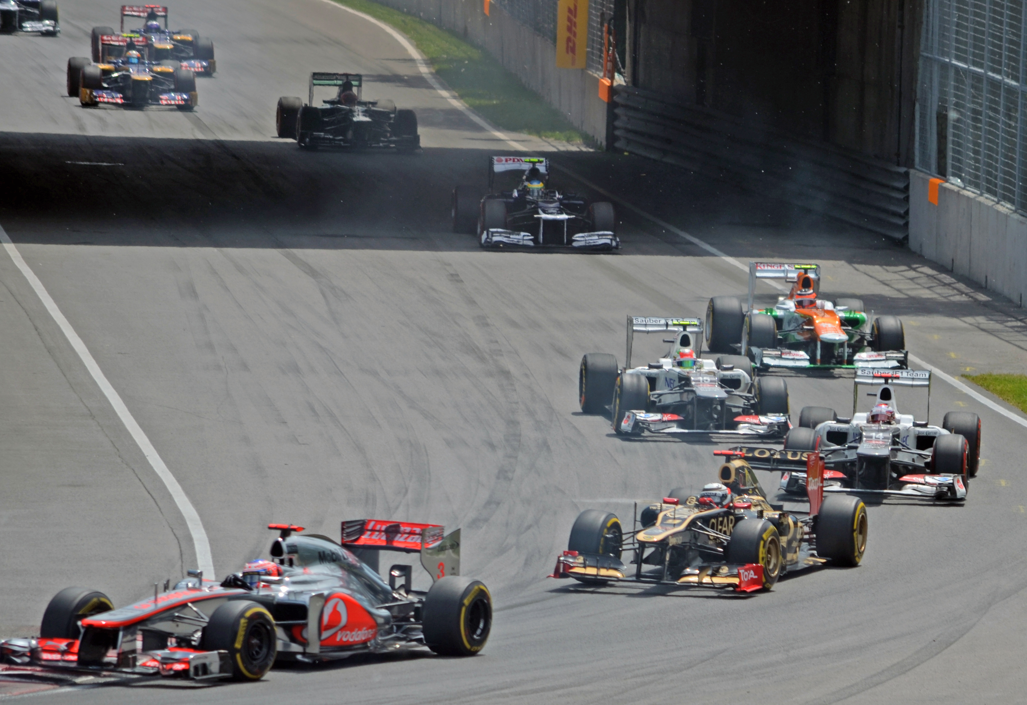 Jenson Button, McLaren - Mercedes MP4-27 Kimi Raikkonen, Lotus - Renault E20 Kamui Kobayashi, Sauber - Ferrari C31 Sergio Perez, Sauber - Ferrari C31 Nico Hulkenberg, Force India - Mercedes VJM05 Bruno Senna, Williams - Renault FW34 Turn 8, Circuit Gilles VIlleneuve, Lap 1, 2012 Canadian Grand Prix